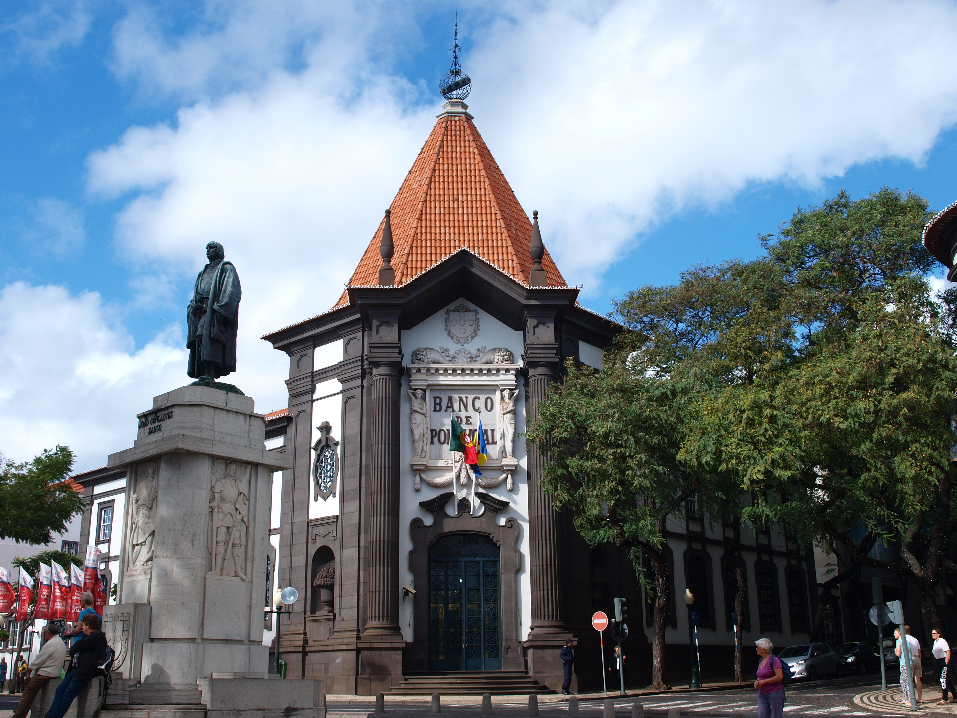 João Gonçalves Zarco vor der Banco de Portugal